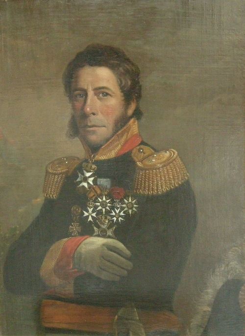 Luitenant Generaal Adriaan Frans Meijer, door Pieneman